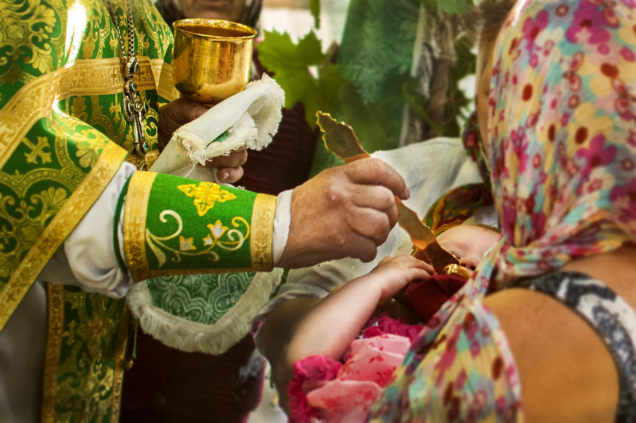 Причастие прихожан в воскресный праздничный день. Храм в честь иконы Божией Матери "Смоленская" в селе Гришино в Янтиковском районе республики Чувашия.